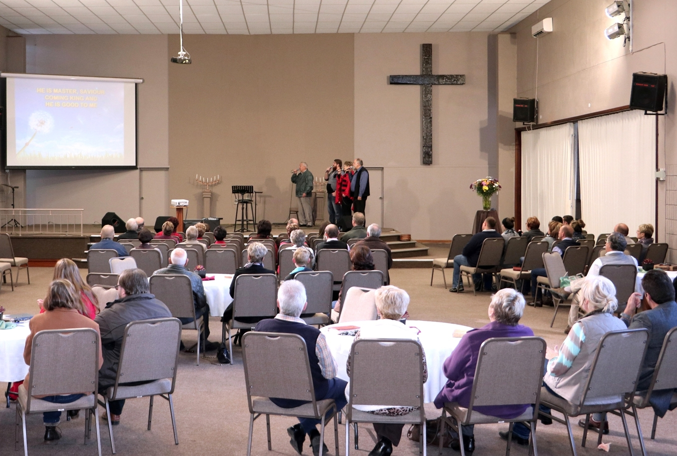 Erediens in Coram Deo NG Kerk in Risiville Vereeniging